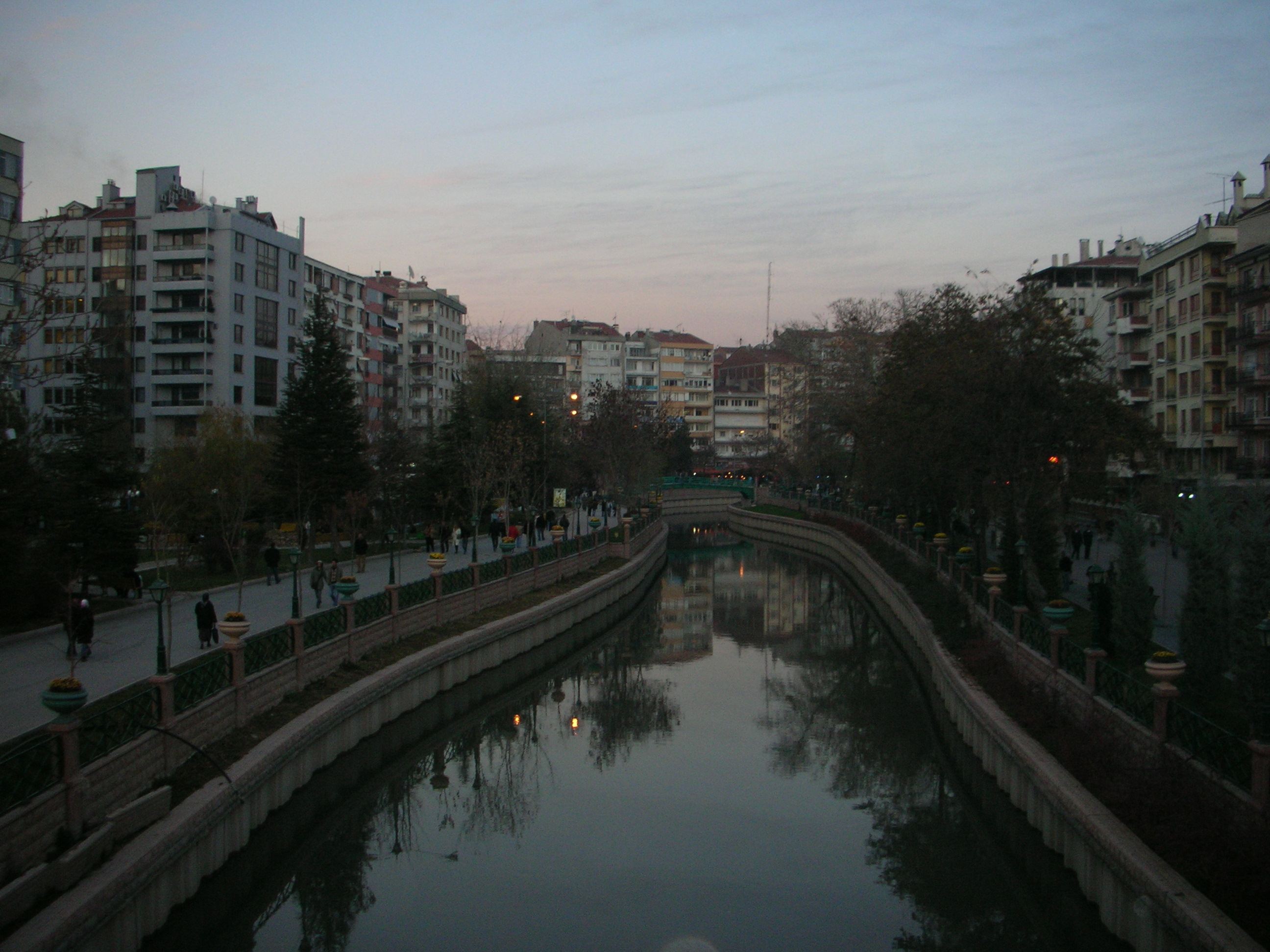 Il fiume che attraversa Eskisehir, Turchia Immagine realizzata da pnc_net